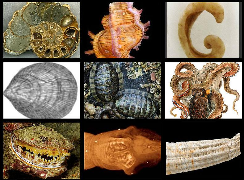 Collage de los moluscos. A petición de esto